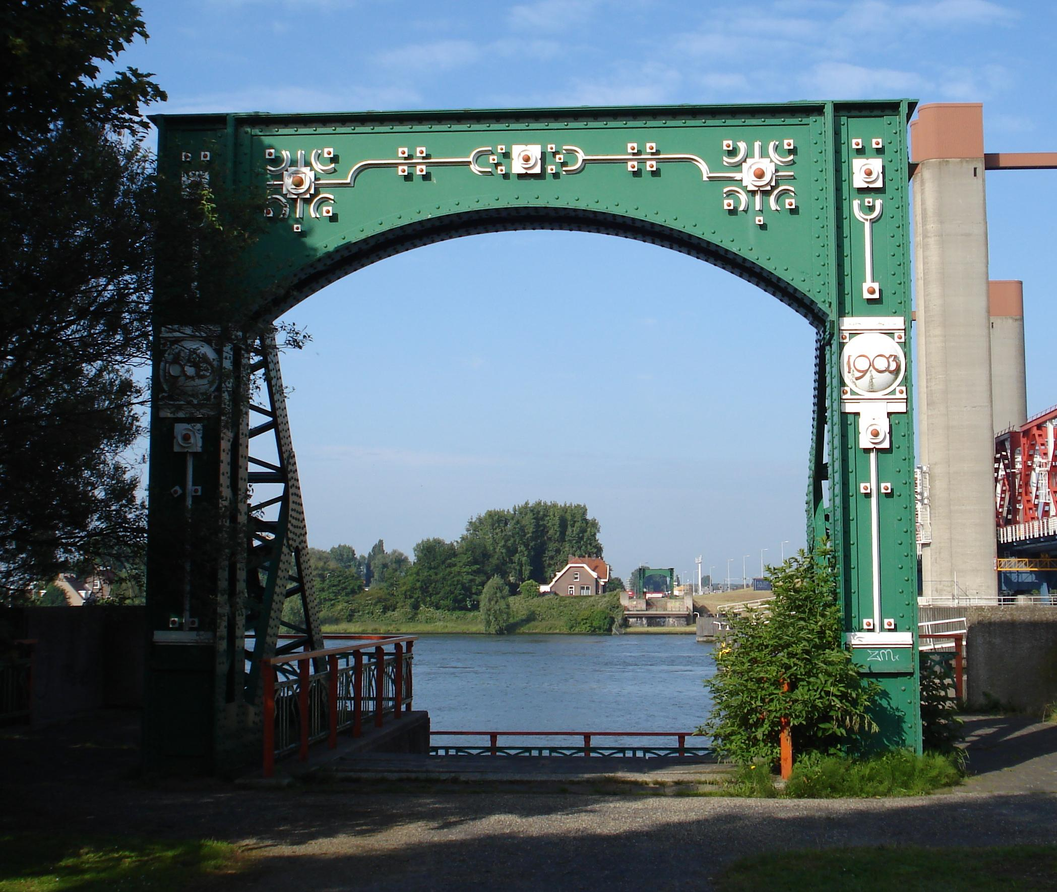 Rotterdam Hoogvliet. Restant oude Spijkenissebrug. Gemeentemonument.